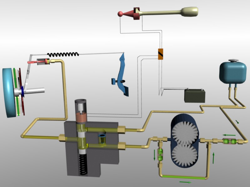 Leerlauf beim Hycomat 3D